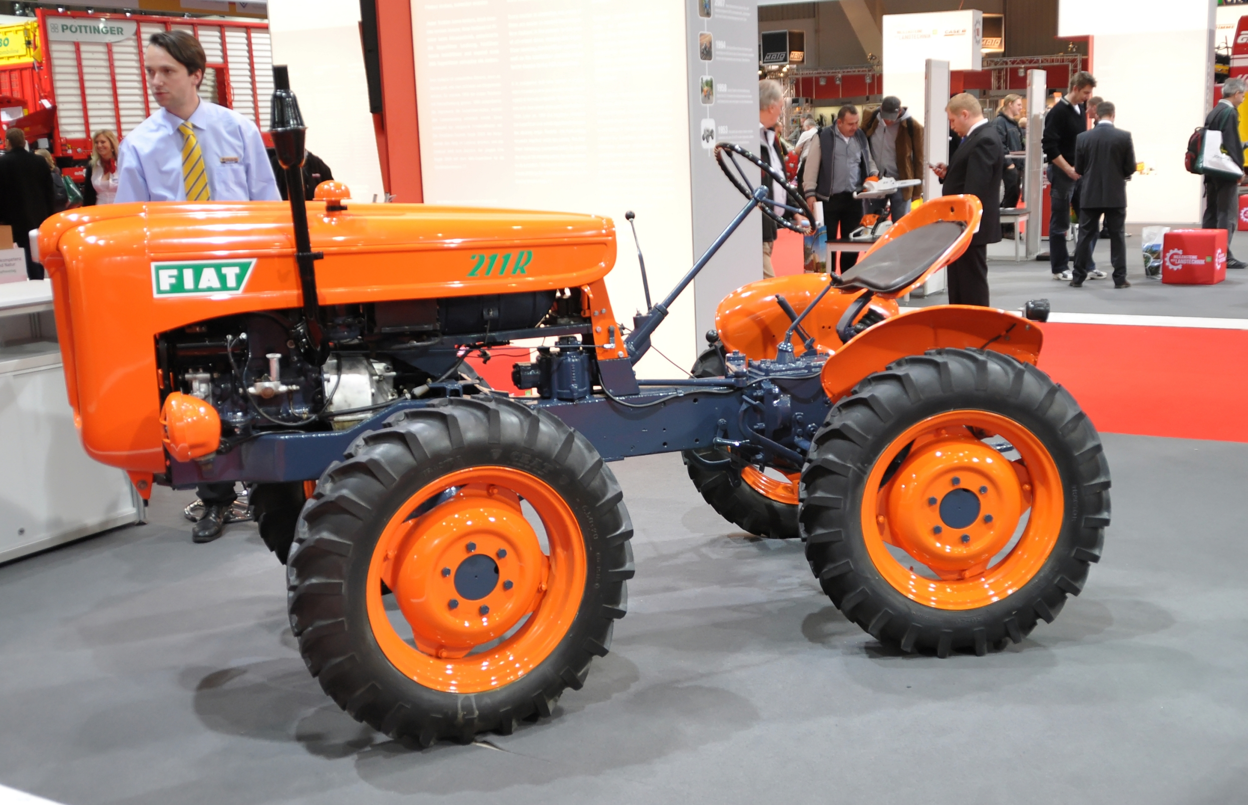 Fiat-Traktor 211R, Agritechnica 2011 Dieses Foto entstand durch die Mithilfe der Wikimedia Deutschland e. V. bei der Akkreditierung als Fotograf. Wikimedia Deutschland e. V. hilft den Freiwilligen der Wikipedia bei der Erstellung von freien Inhalten.